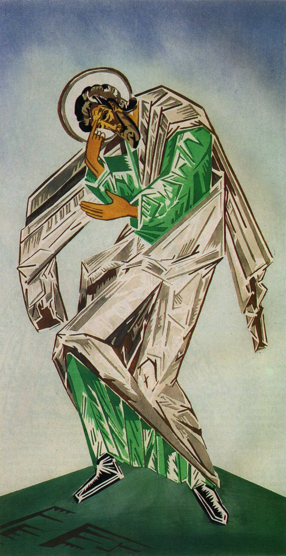 Н.С. Гончарова. Эскиз костюма св. Матфея к балету "Литургия". 1915.